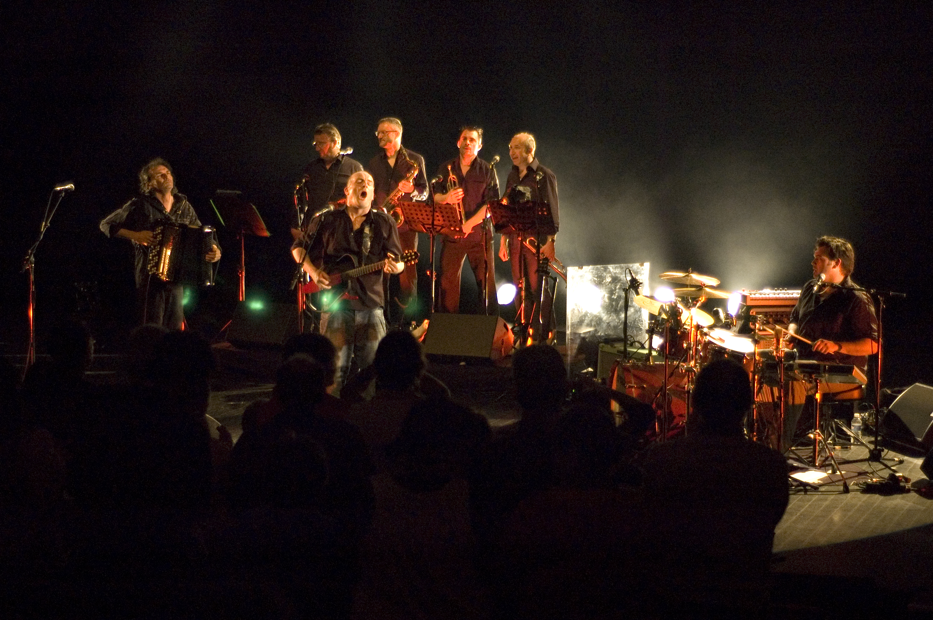 Pont-l'Abbé 2010